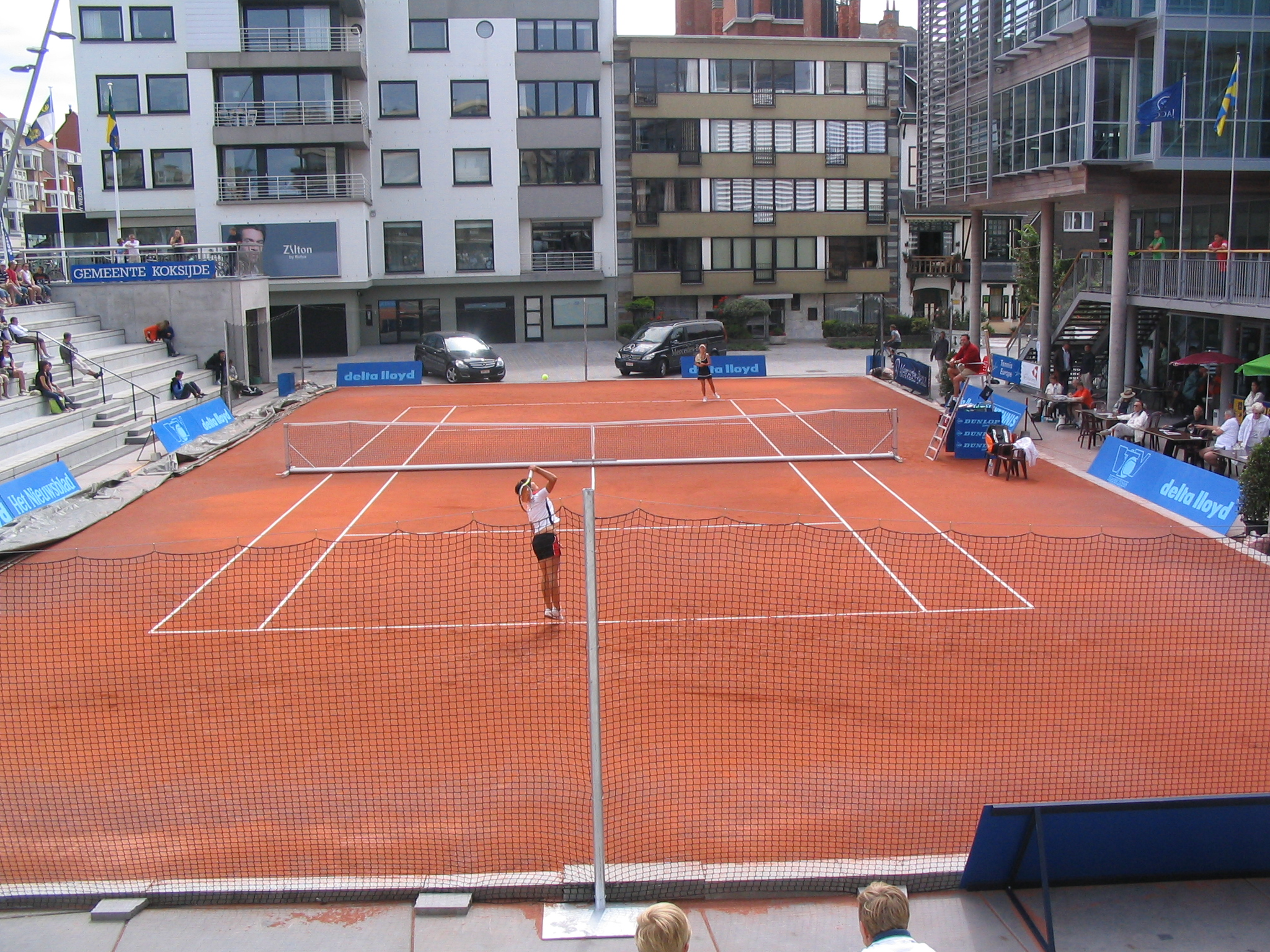 Match de tennis féminin entre McCall Jones (USA) et Katarina Polunina (UKR), lors du tournoi Flanders Ladies Trophy 2007 de Coxyde (Belgique), 1er tour, 14 août 2007